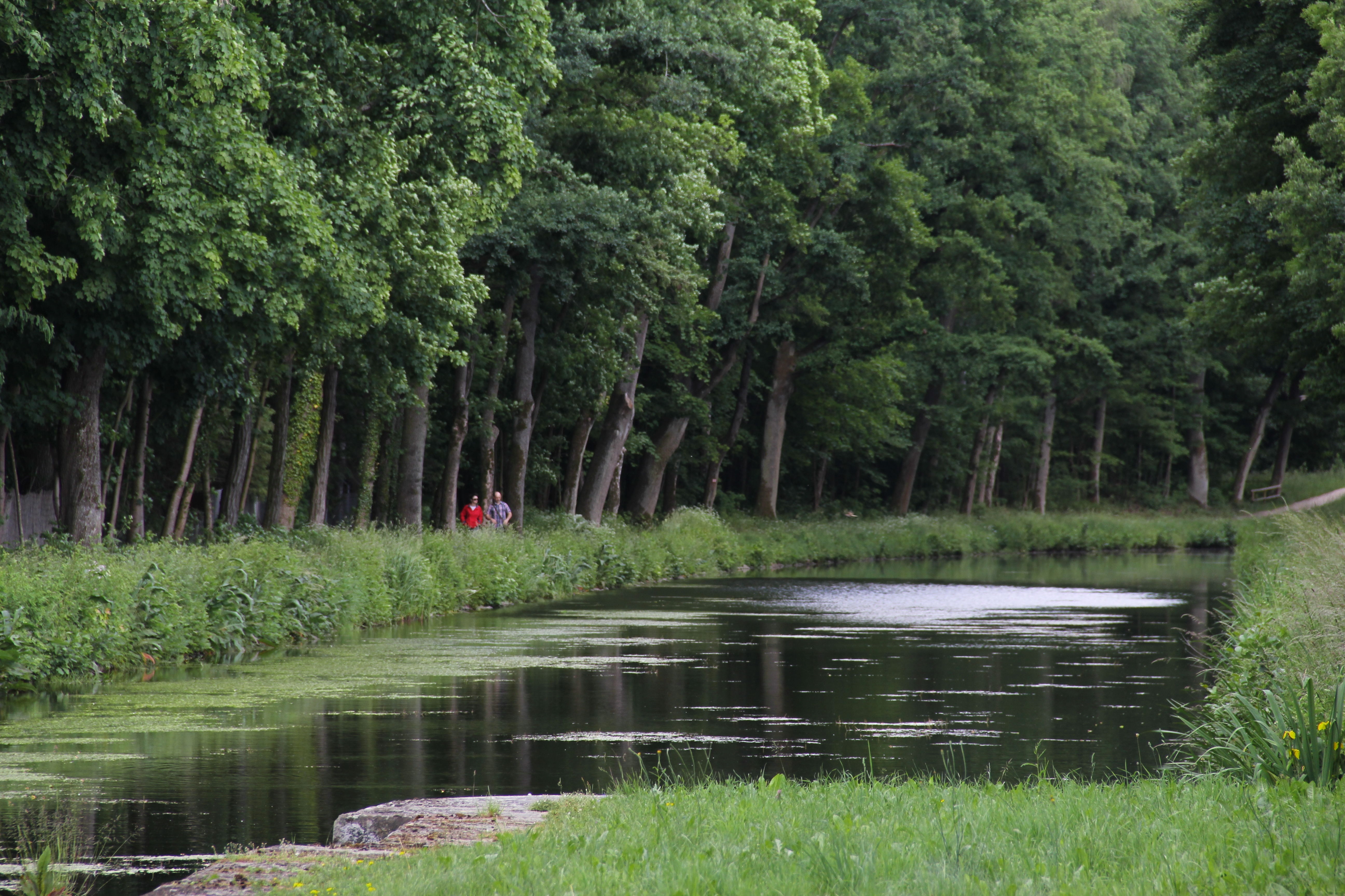 Kanal